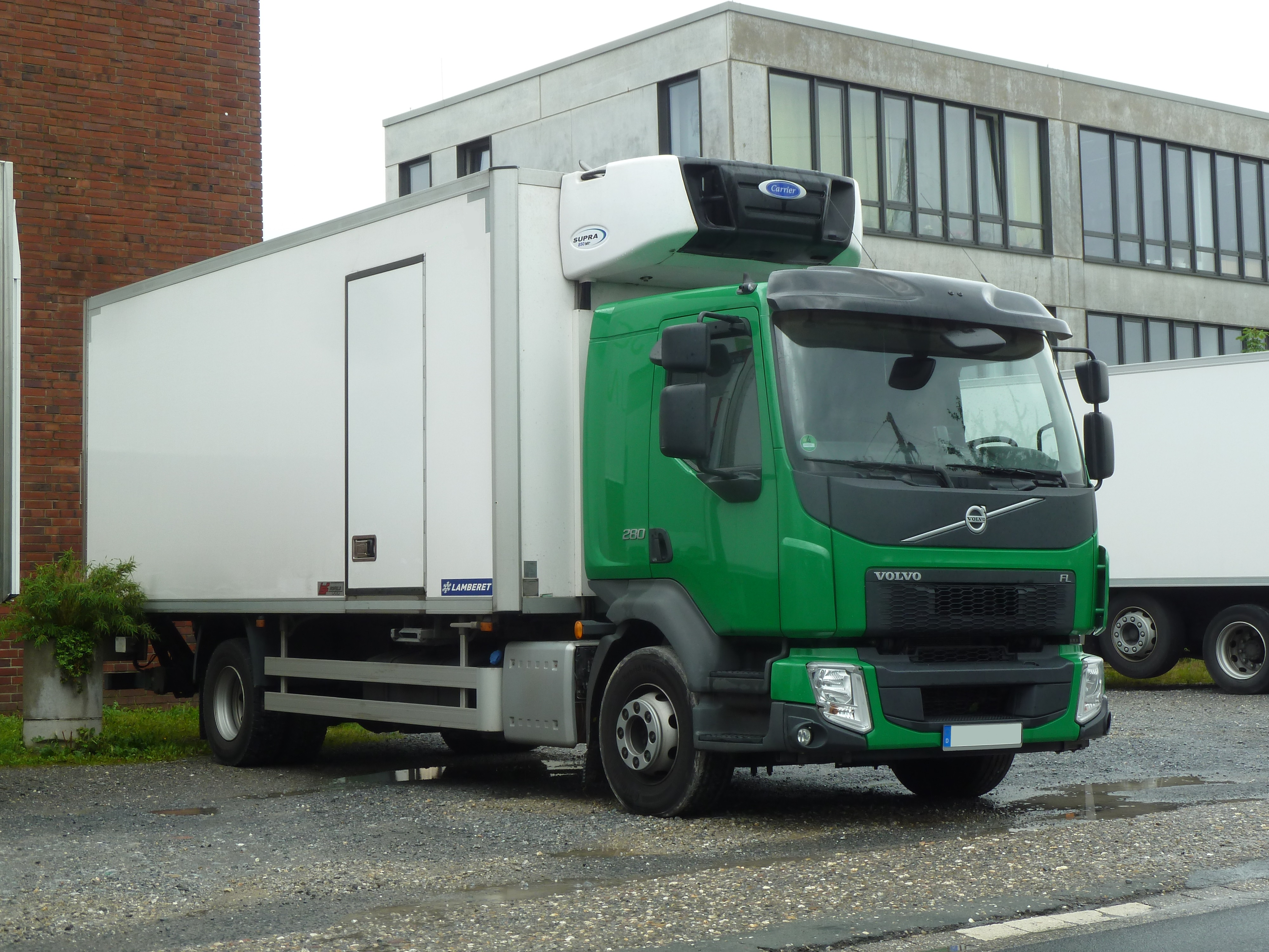 Volvo FL 280 Modell 2013 Kühlkoffer-LKW